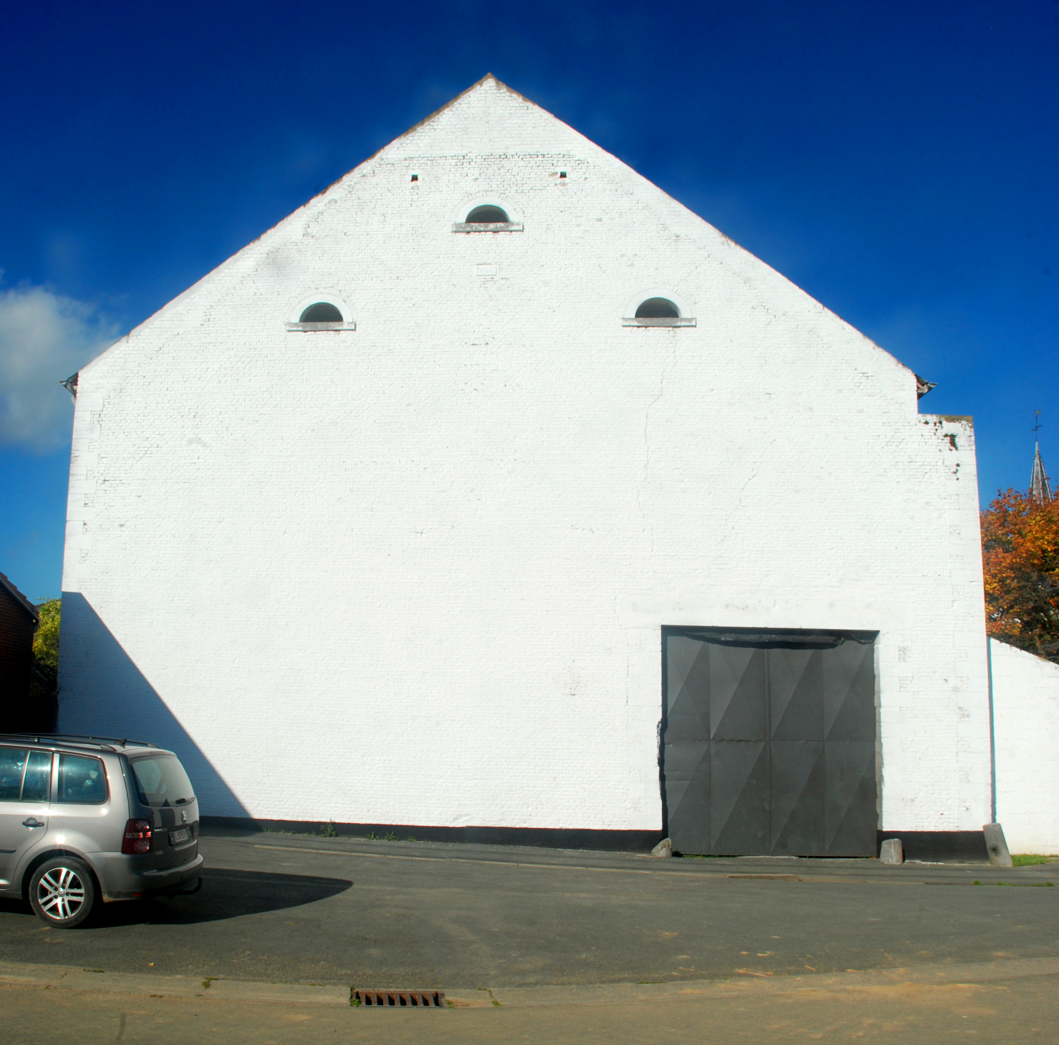 Belgique - Brabant wallon - Nivelles - Thines - ferme située en face de l'église Sainte-Marguerite